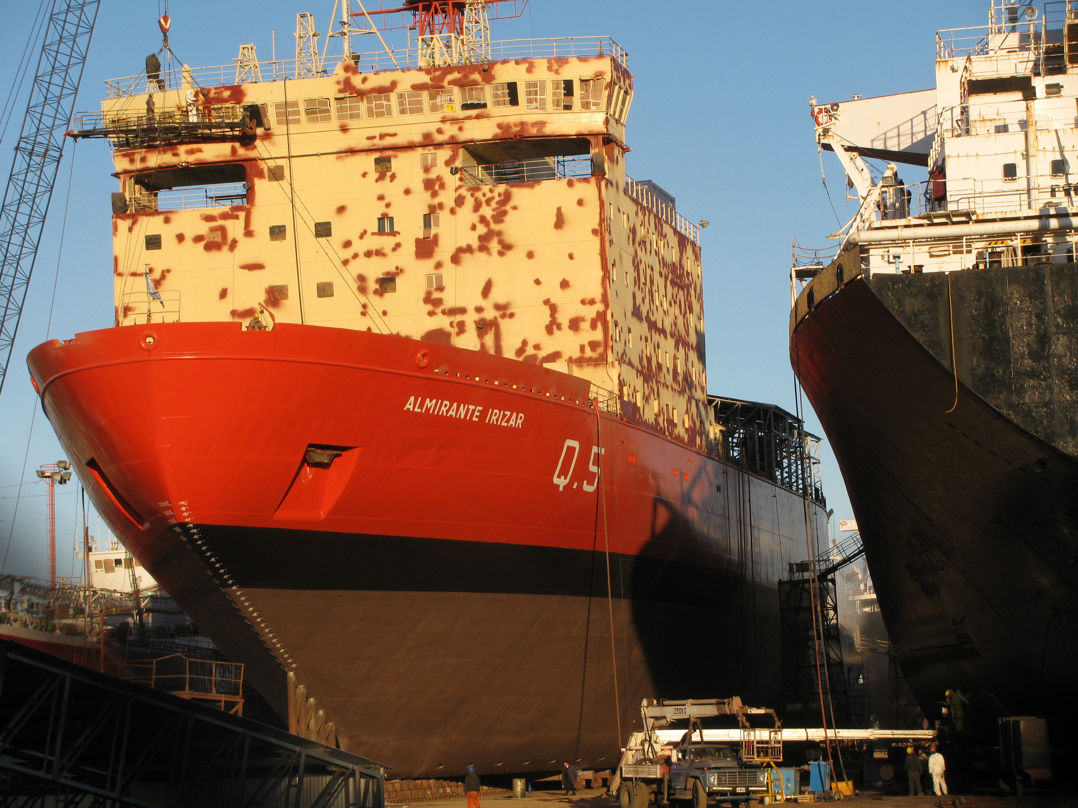 El rompehielos ARA Almirante Irízar en reparación en el astillero CINAR, (Complejo Industrial Naval Argentino)